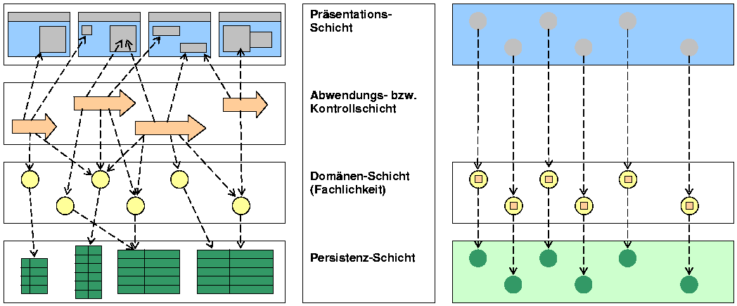 Möglicher Aufbau eines CRUD-Frameworks (rechte Seite)